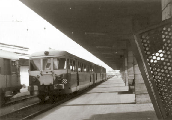 Foto di locomotiva